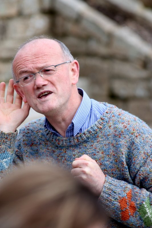 Photographie de Jean-Pierre Mathias, conteur, à Cléguer, en 2010.